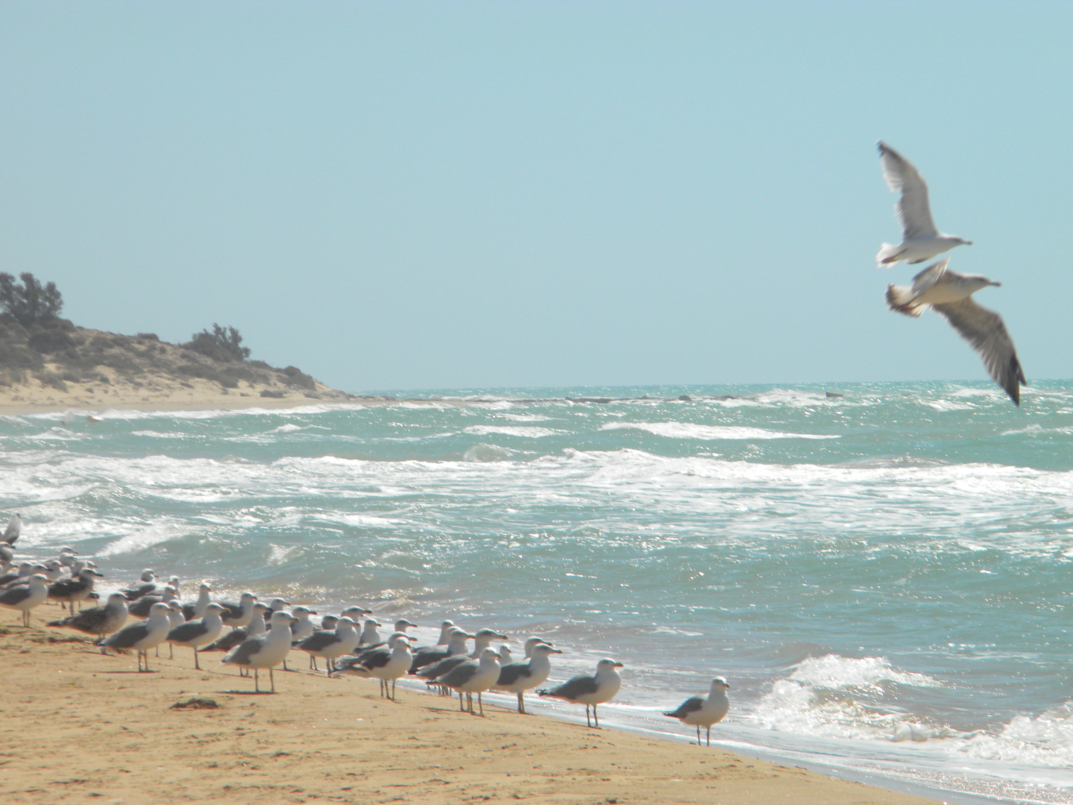 Riserva Naturale Torre Salsa